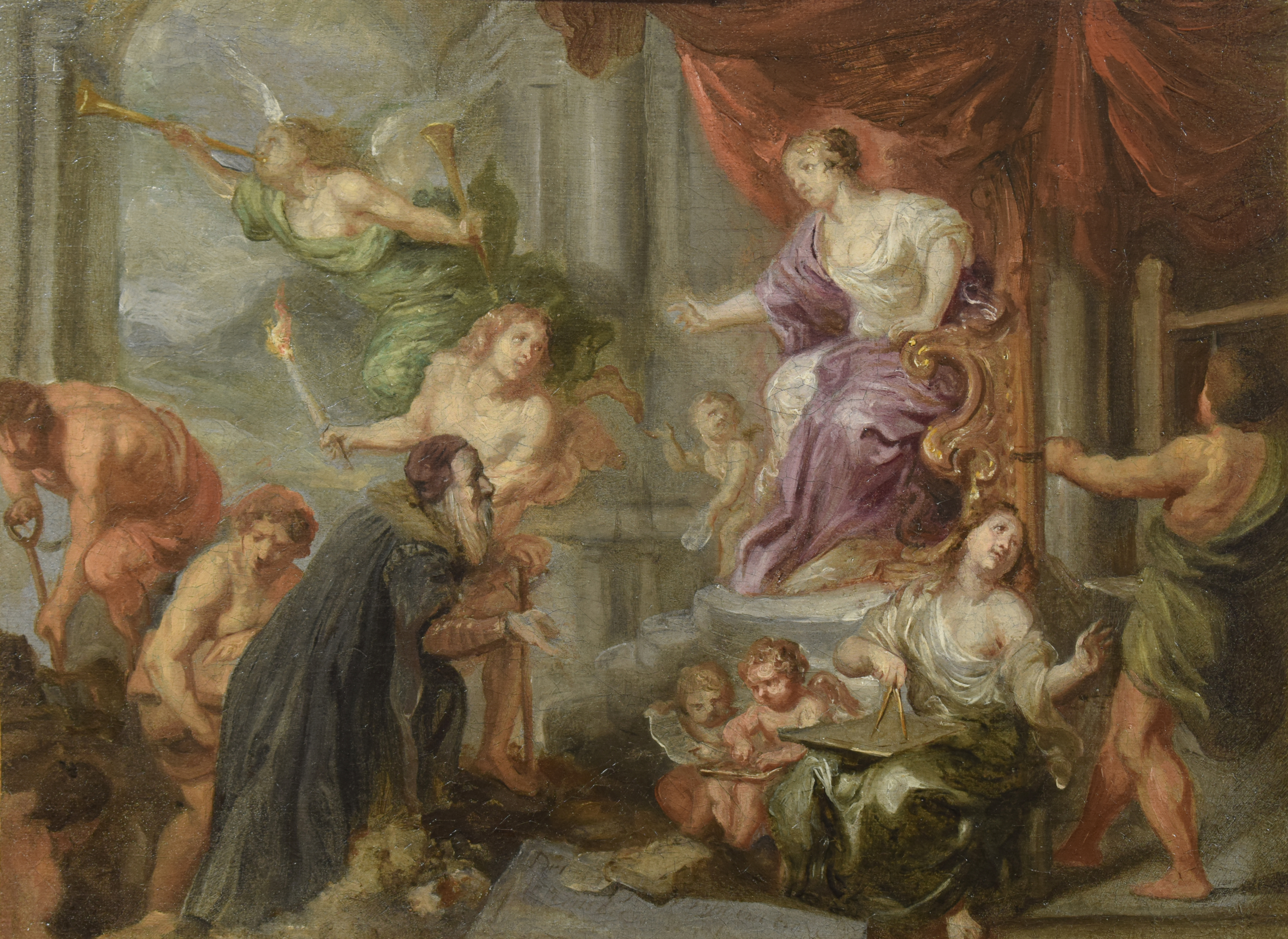 Huile sur Toile - 31 x 42 cm Anvers, Musée Plantin-Moretus Photo : Musée Plantin-Moretus